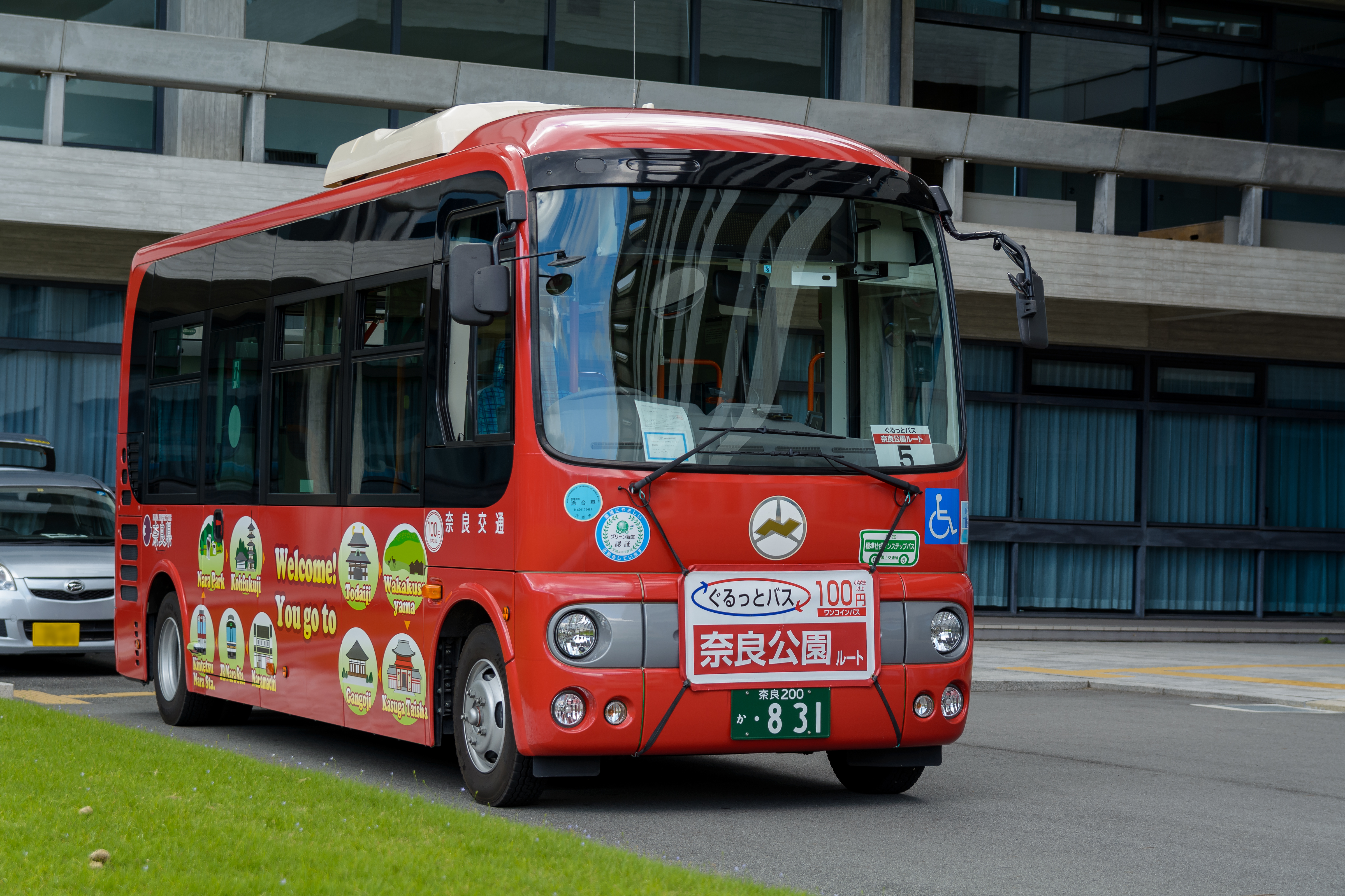 奈良県庁に停車中の奈良交通ぐるっとバス（2014年6月発表）